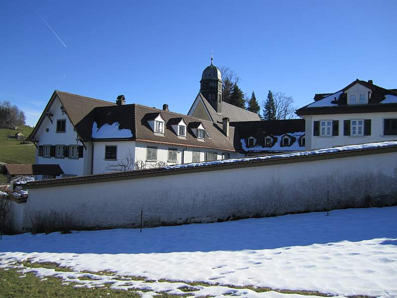 Kloster Wonnenstein, Teufen AR, CH